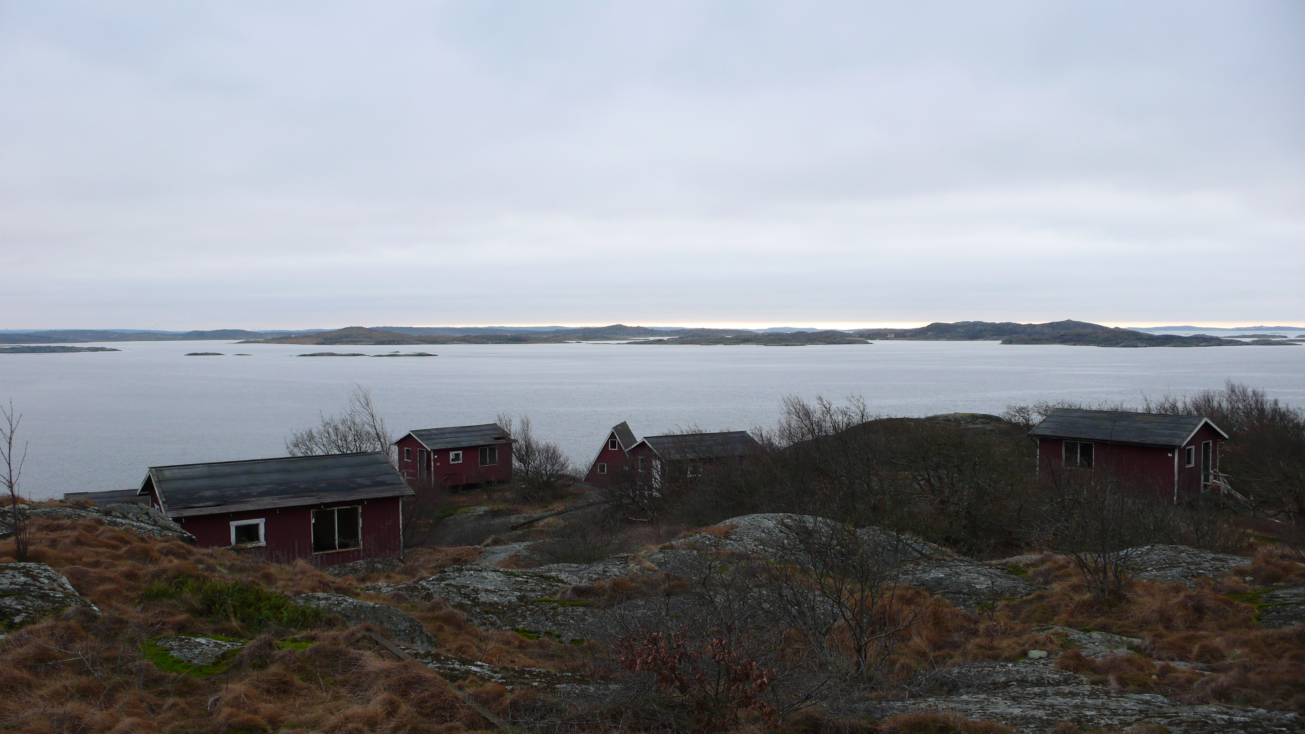 Trälen